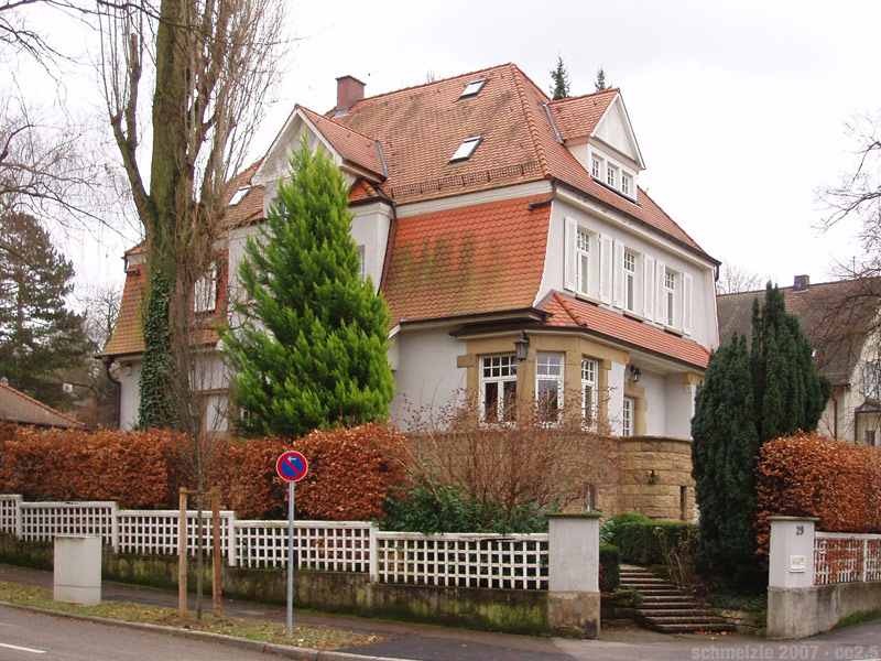 Villa Moosbrugger, Gutenbergstr. 29 in Heilbronn, Moosbrugger war Architekt und hat weitere Bauten in Heilbronn errichtet